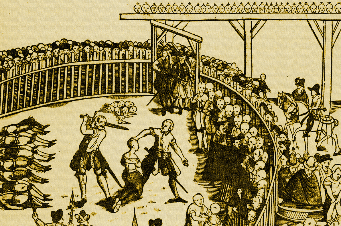 Hinrichtung von Seeräubern am 10 September 1573 in Hamburg (Ausschnitt)